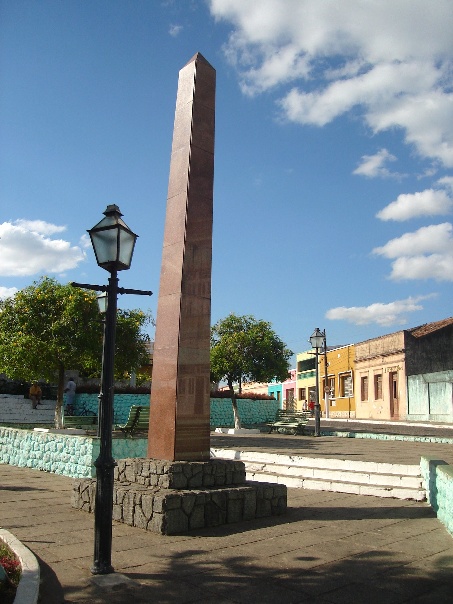 Obelisco de Areia, Paraíba, Brasil.